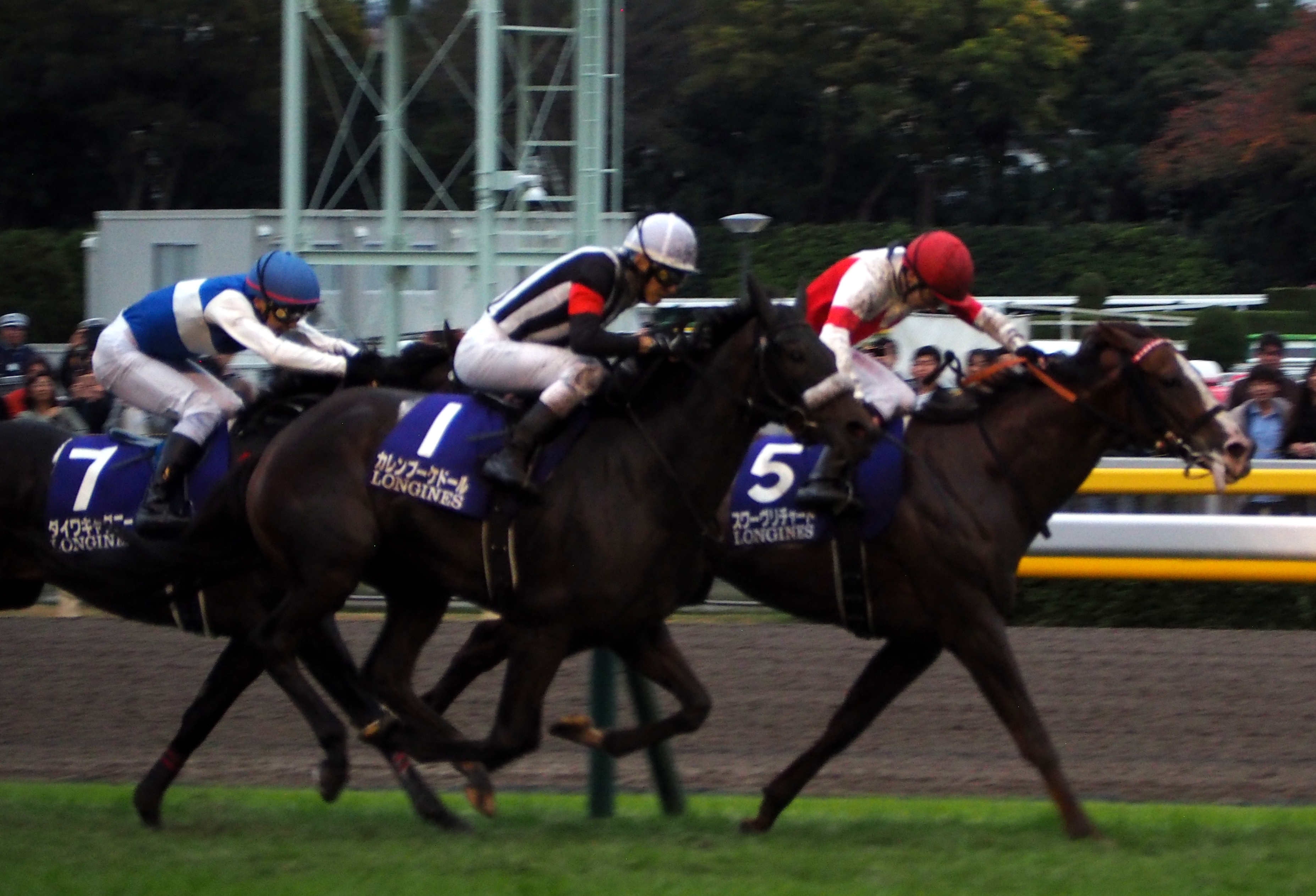 ジャパンカップ 2019 最後の直線 カレンブーケドールとスワーブリチャード、ダイワキャグニー